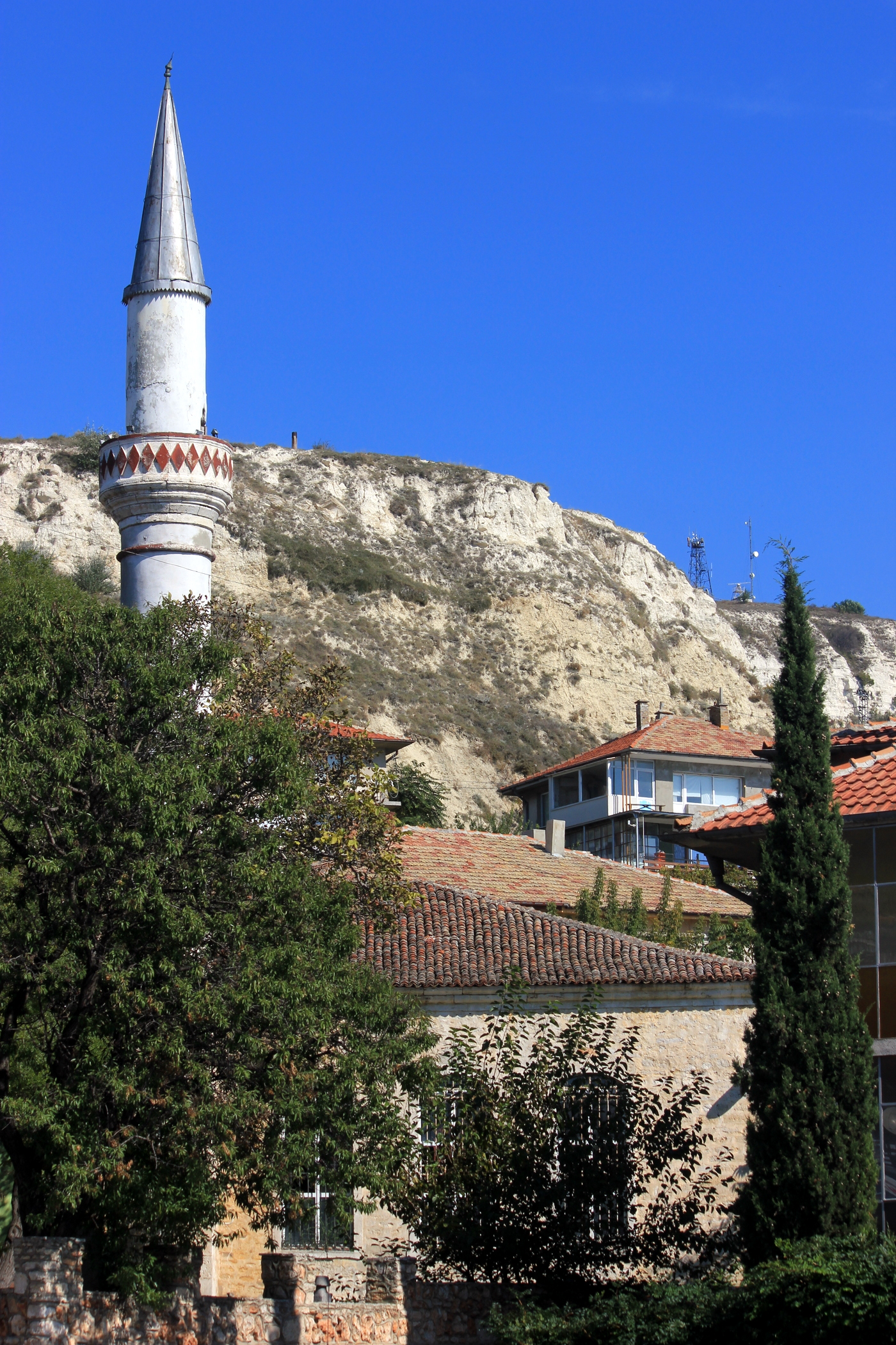 Moschee im Zentrum von Baltschik.